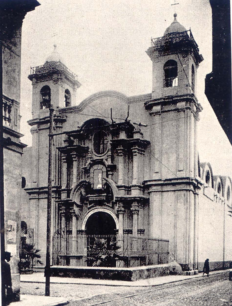 Antigua Iglesia de Santa Rosa de Lima que fuera demolidad en la década de los 40 del siglo XX para ampliar la Avenida Tacna.